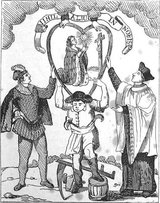 "Fac-similé d'une estampe d'après un tableau du XVIe siècle" conservé à l'hôtel de ville d'Aix-en-Provence.